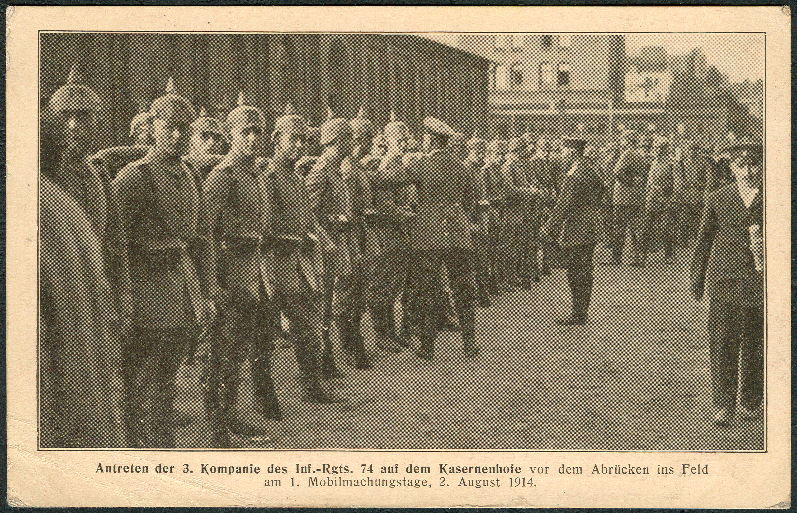 "Ansichtskarte" vom (sinngemäß) „1. Mobilmachungstage für den Ersten Weltkrieg am 2. August 1914“ beginnend mit dem „Antreten der 3. Kompanie 1. Hannoverschen Infanterie-Regiments Nr. 74 auf dem Kasernenhof am Welfenplatz.“ Nachdem "Oberleutnant Oesterreich" die Aufstellung überwacht hatte, konnte zunächst offenbar das "1. Bataillon" durch die auf dem Welfenplatz versammelte Volksmenge hindurch "ins Feld" ausrücken. Gegen Ende 1916 nahm der Unteroffiziert Henry Harland die als Postkarten reproduzierten Fotos, „Gewidmet von der Continental-Caoutchouc- und Gutta-Percha-Compagnie Hannover“ , um sowohl seiner lieben Schwester Fridel' und seinem Vater Wilhelm in der Angerstraße 8 in Hannover (Überlebens-)Nachrichten von der Westfront zukommen zu lassen. Inzwischen war der Unteroffizier offensichtlich der 11. Kompanie zugeteilt worden, die Feldpost-Stempel von der "19. Infanterie-Division".wurden teilweise jedoch „Aus militärischen Gründen verzögert.“ ...